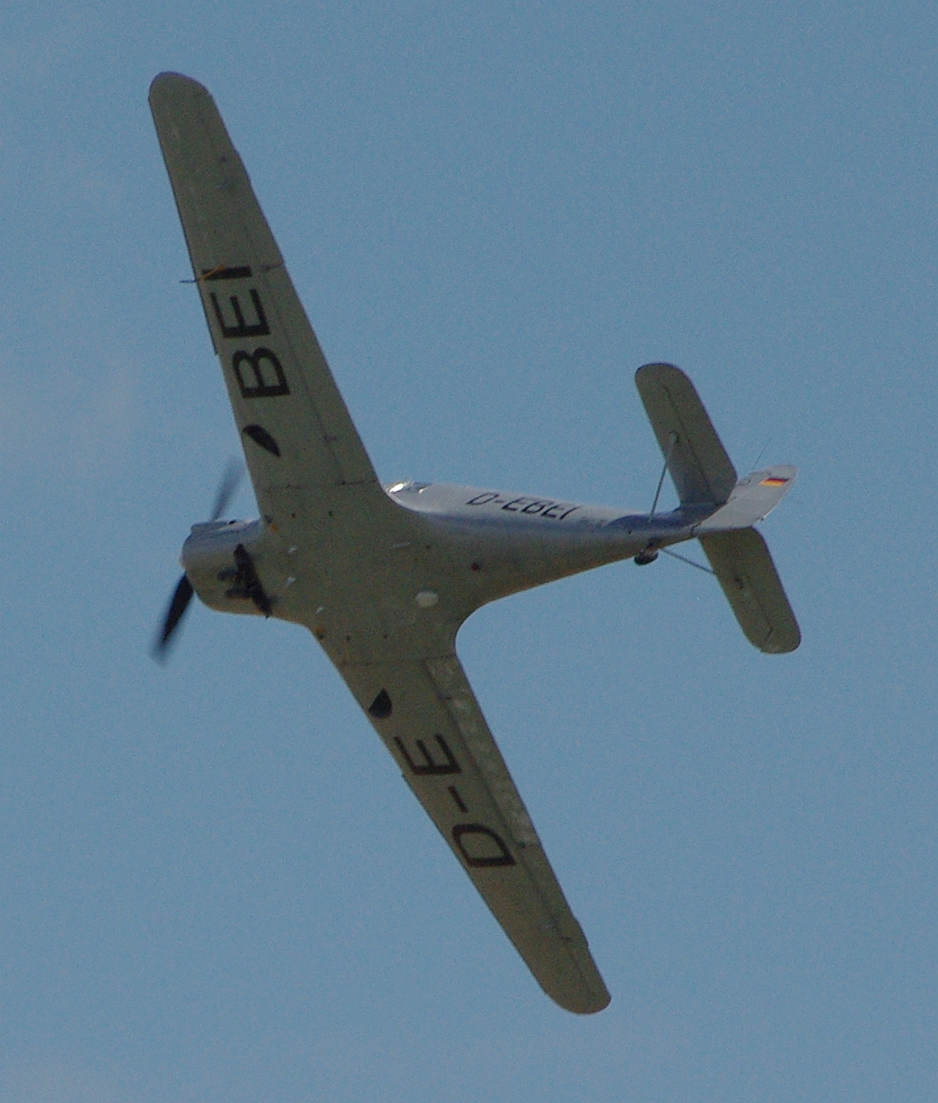 Messerschmitt Bf 108B-1 Taifun at Flying Legends 2009